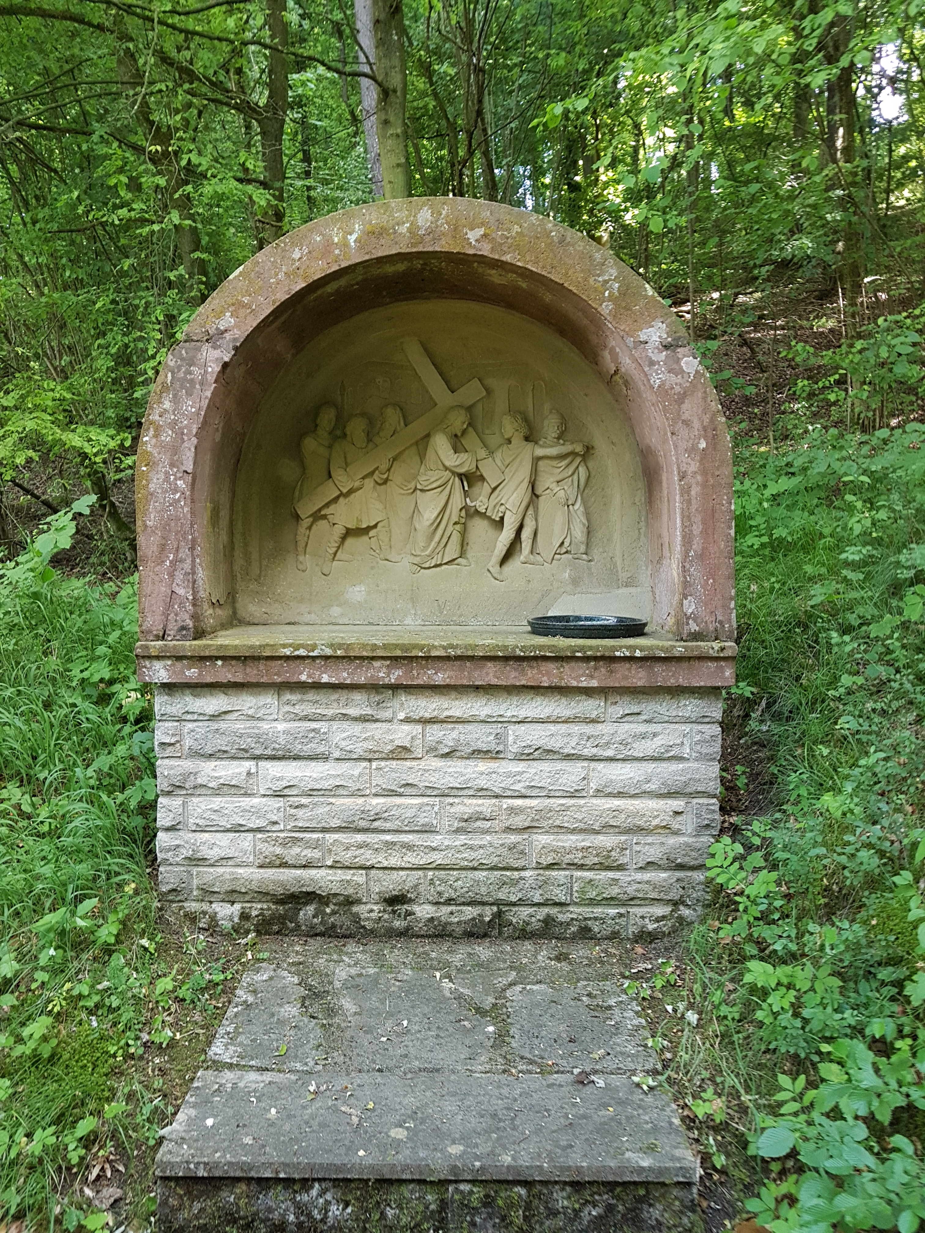 Kreuzweg zur Dittwarer Kreuzkapelle am Kreuzhölzle Bilder hochkant